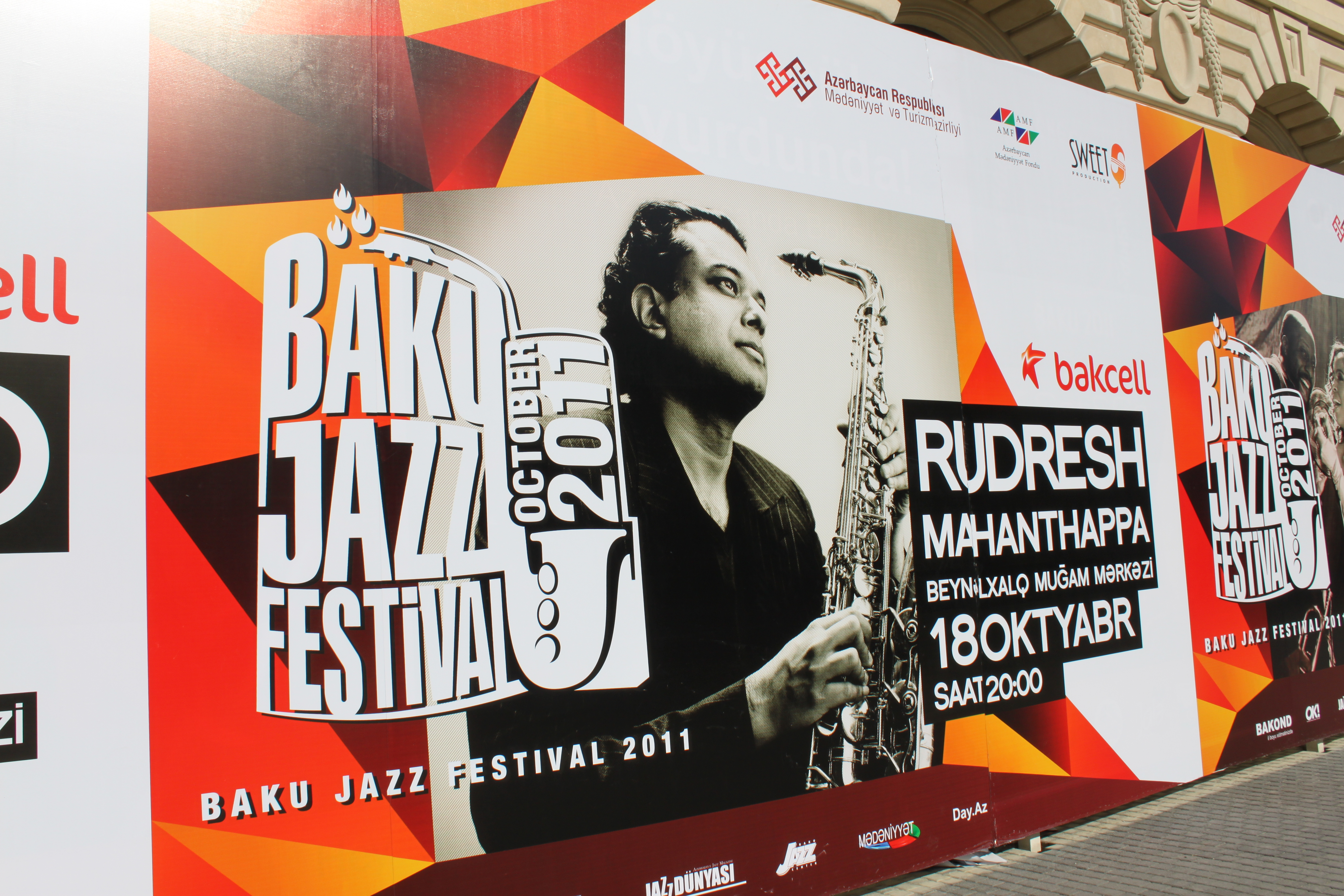 Плакат Джаз фестиваля в Баку